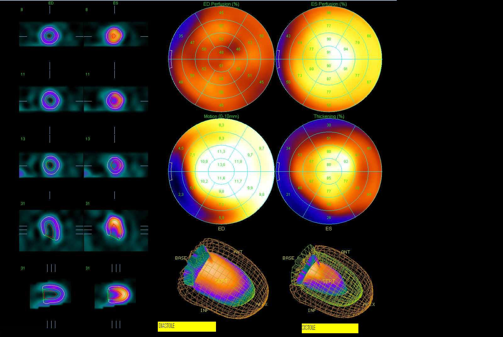 Imagenes de movimiento en telediastole y telesistole. Estudio de perfusion miocardica normal, FE: 60%